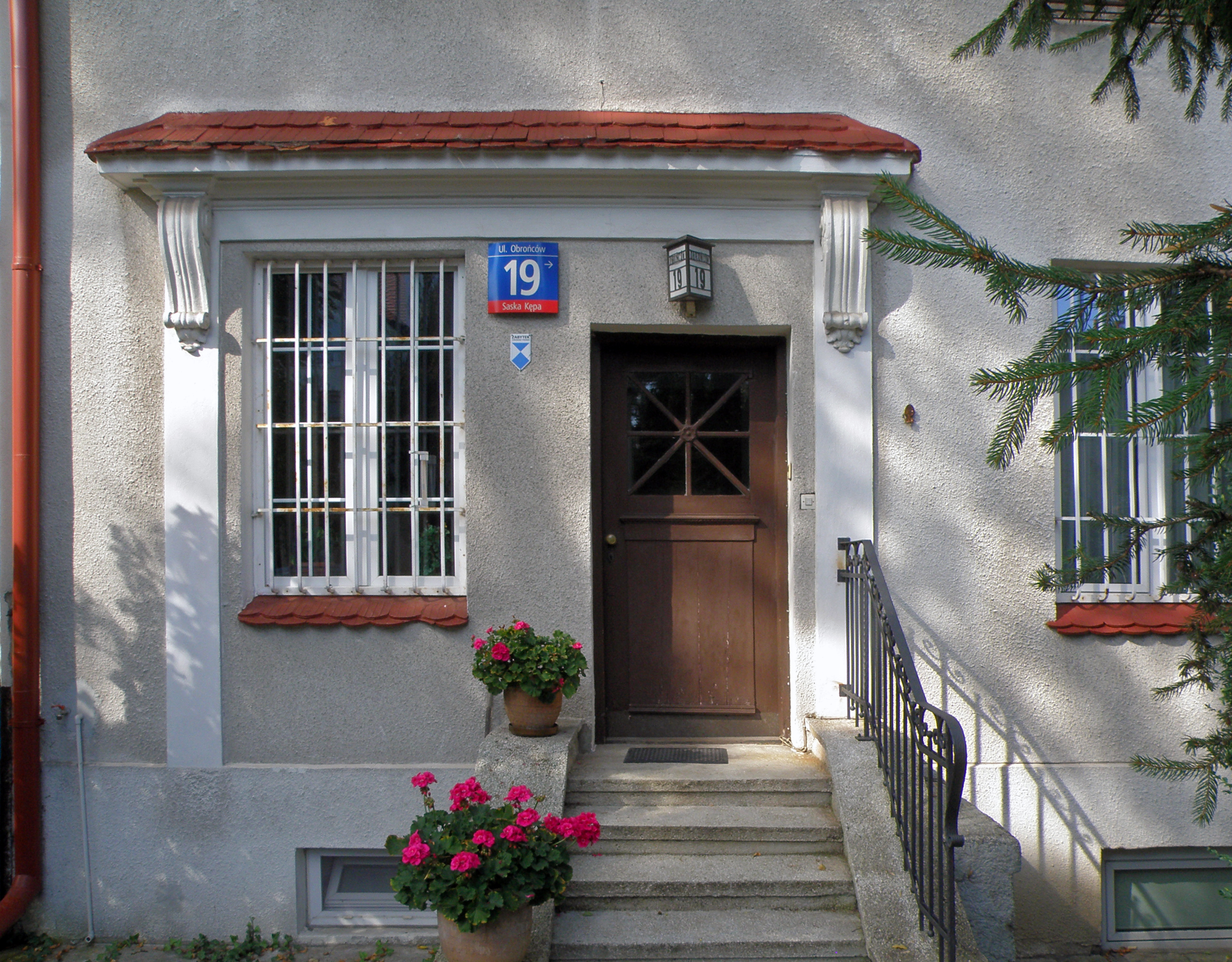 Dom, ok. 1930, ul. Obrońców 19 (964 A z 13.06.1979), Warszawa.